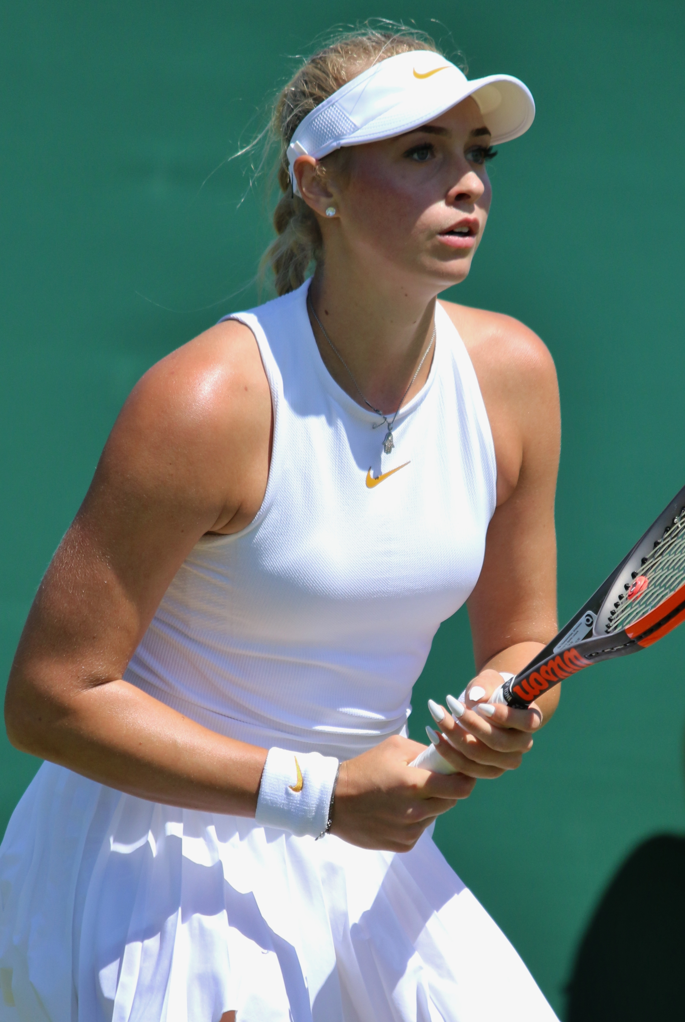 Stollar WMQ18 (39)